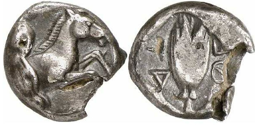 Hemidrachme des thessalischen Bundes, um 470-450 v. Chr., Silberprägung